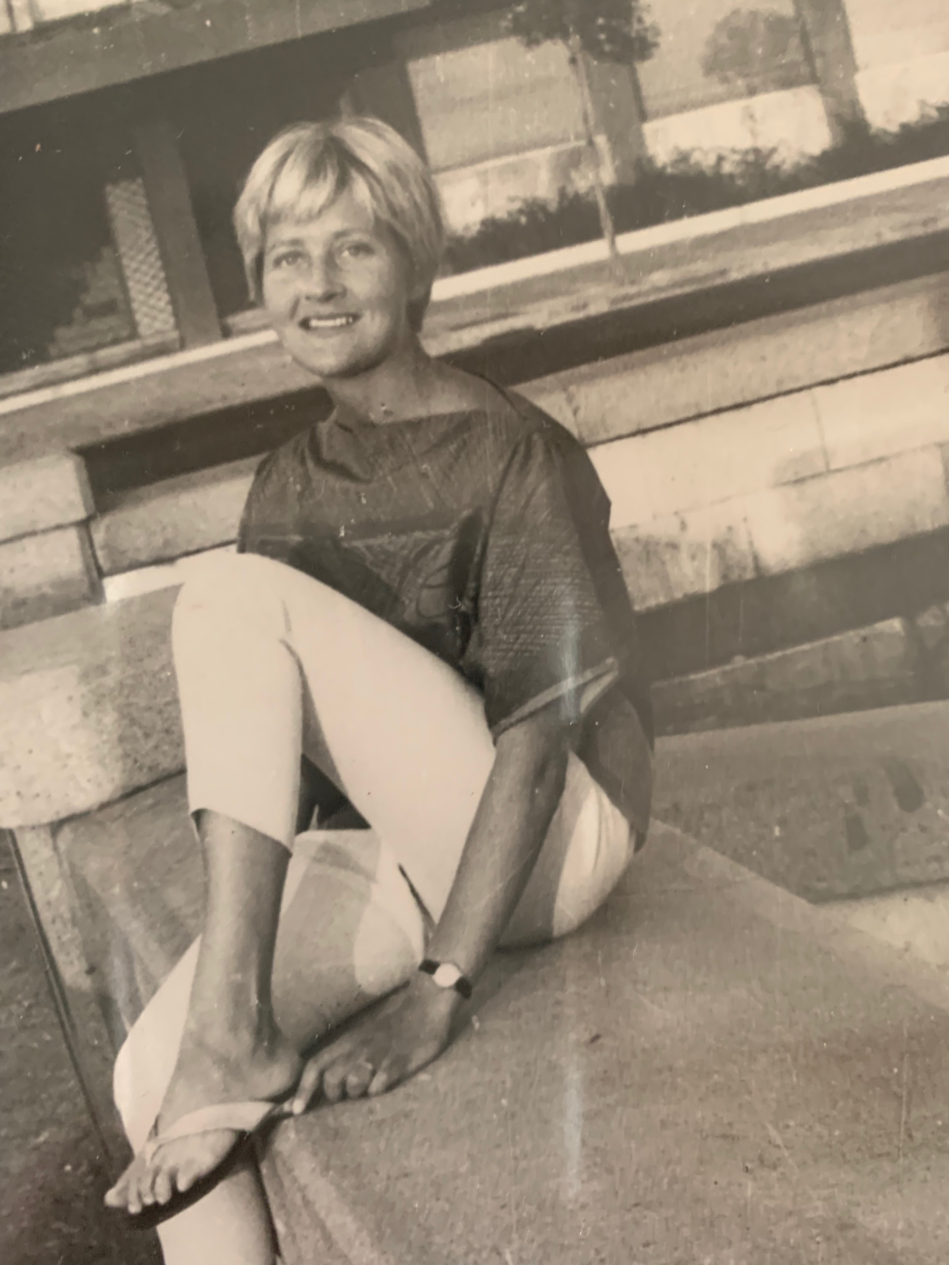 Birgitta Troili 1958